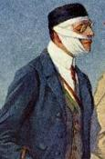 "Renommierbummel" (Ausschnitt)